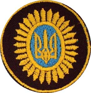 Нашивний беретний знак (кокарда), до беретів чорного кольору